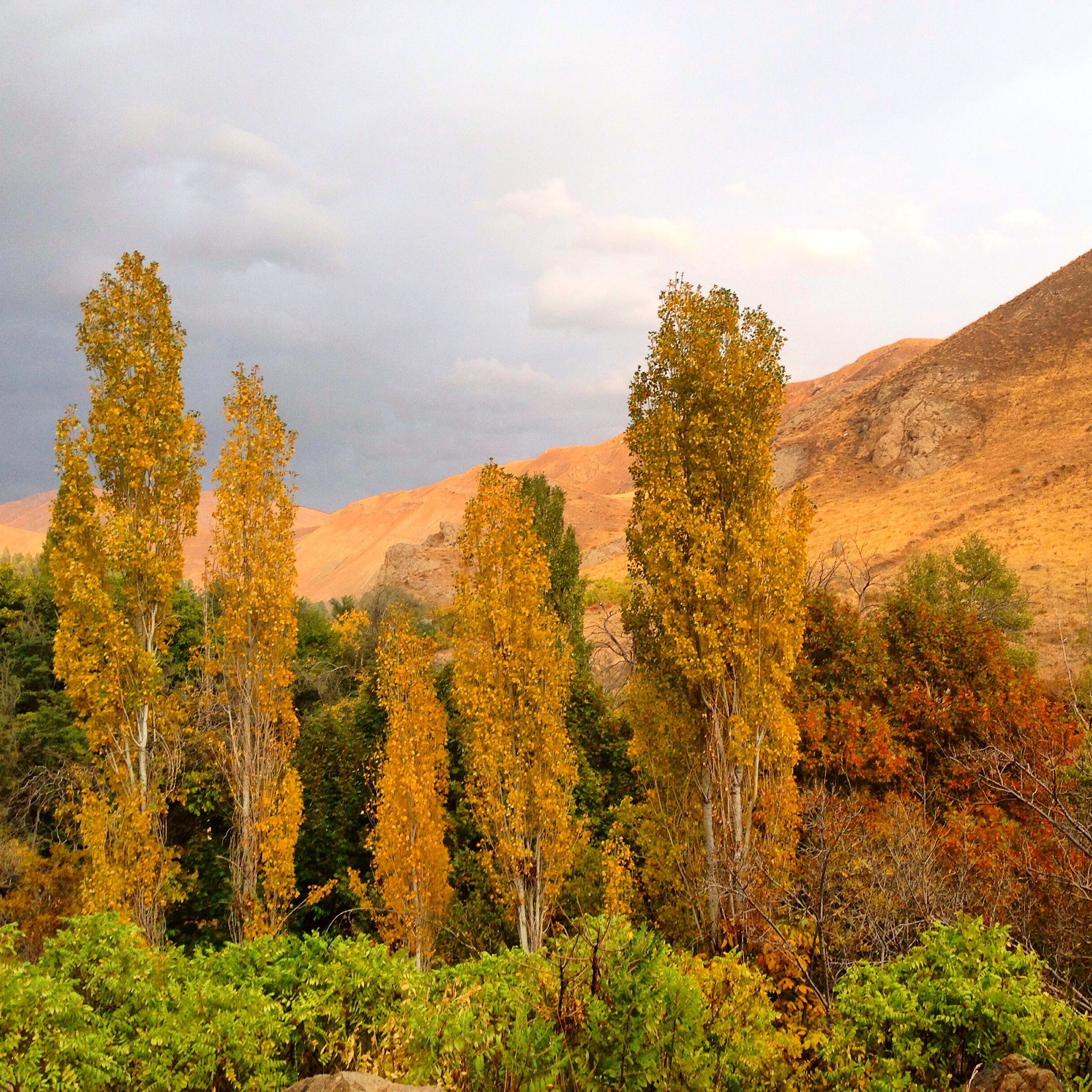 روستای کردان، استان البرز، ایران